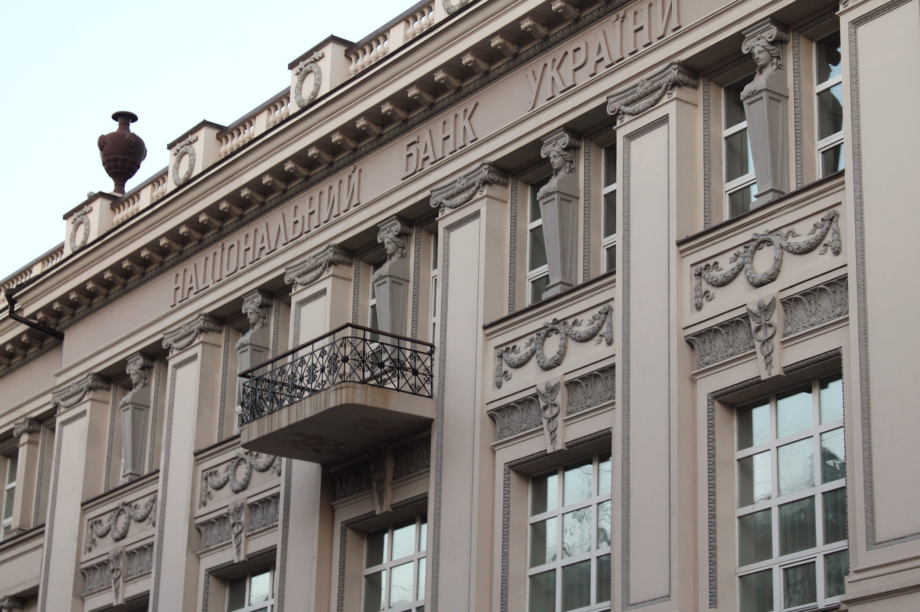 Філія Національного банку України у Дніпропетровській області.